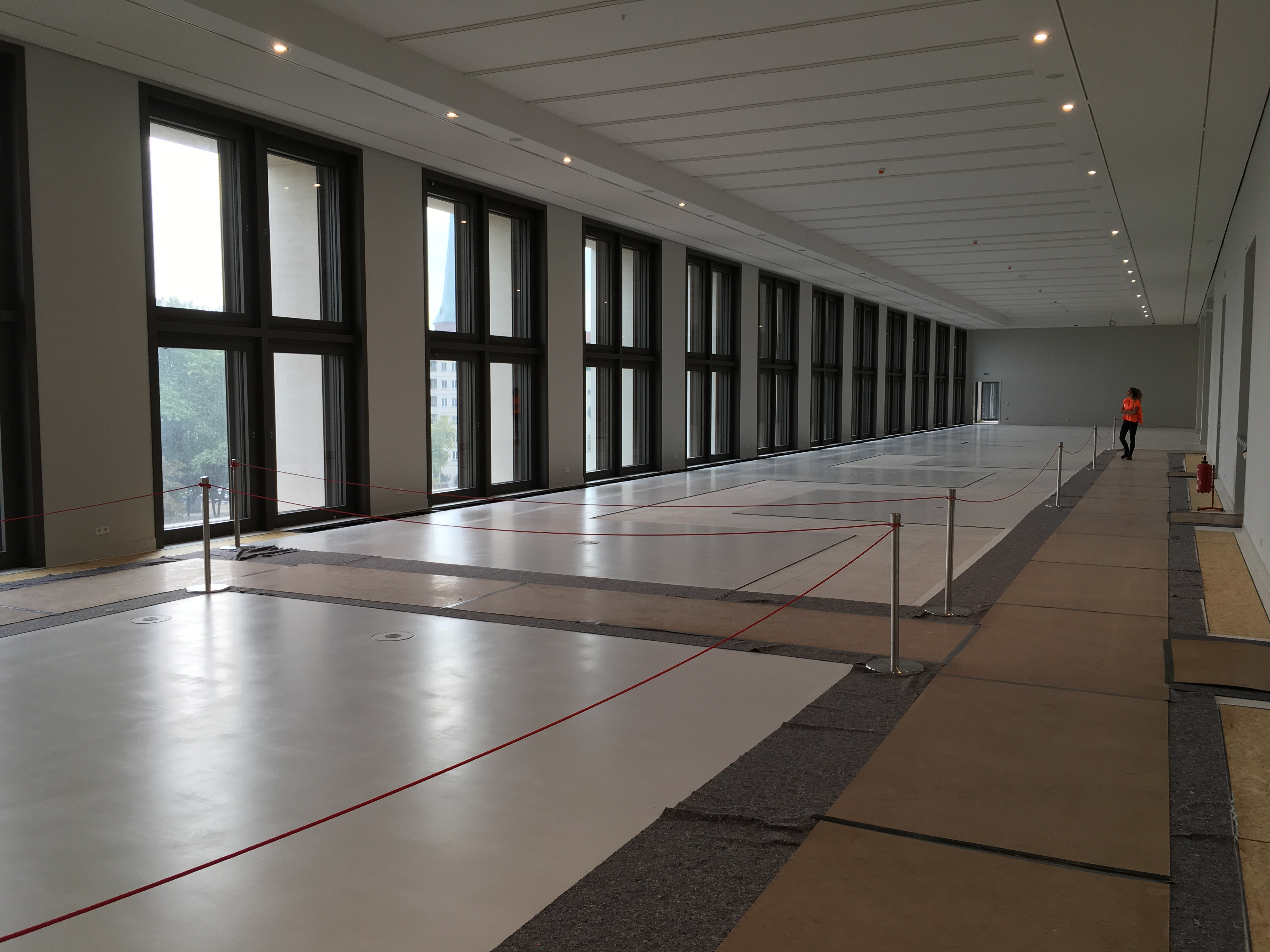 Humboldtforum 2. OG Baustelle 2018